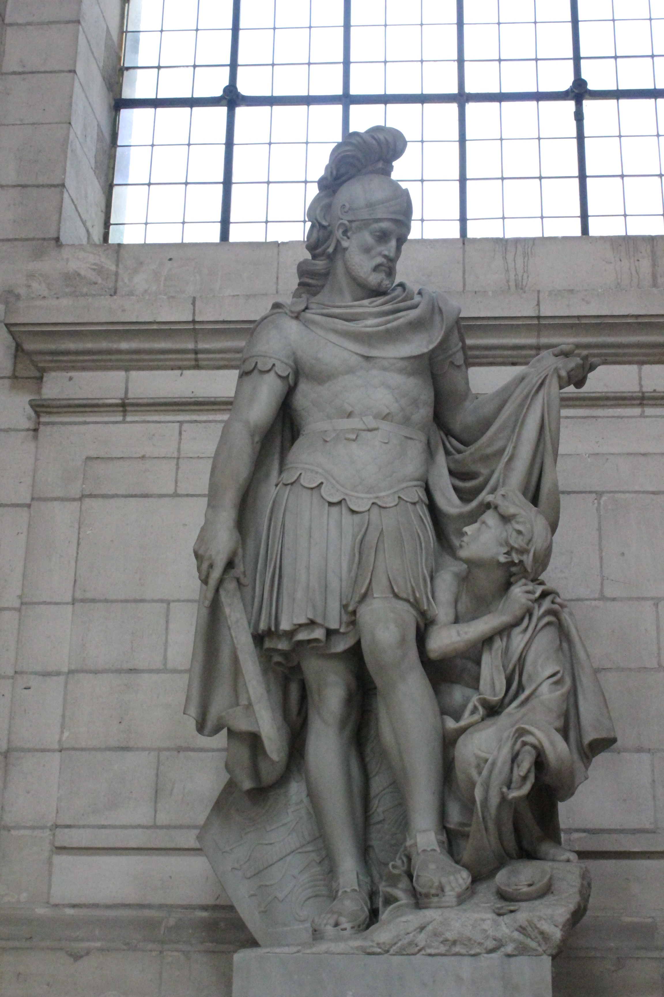 Cathédrale Notre-Dame-et-Saint-Vaast d'Arras, statue de Saint Martin de Tours, commencée par Paul Cabet, accomplie par Just Becquet